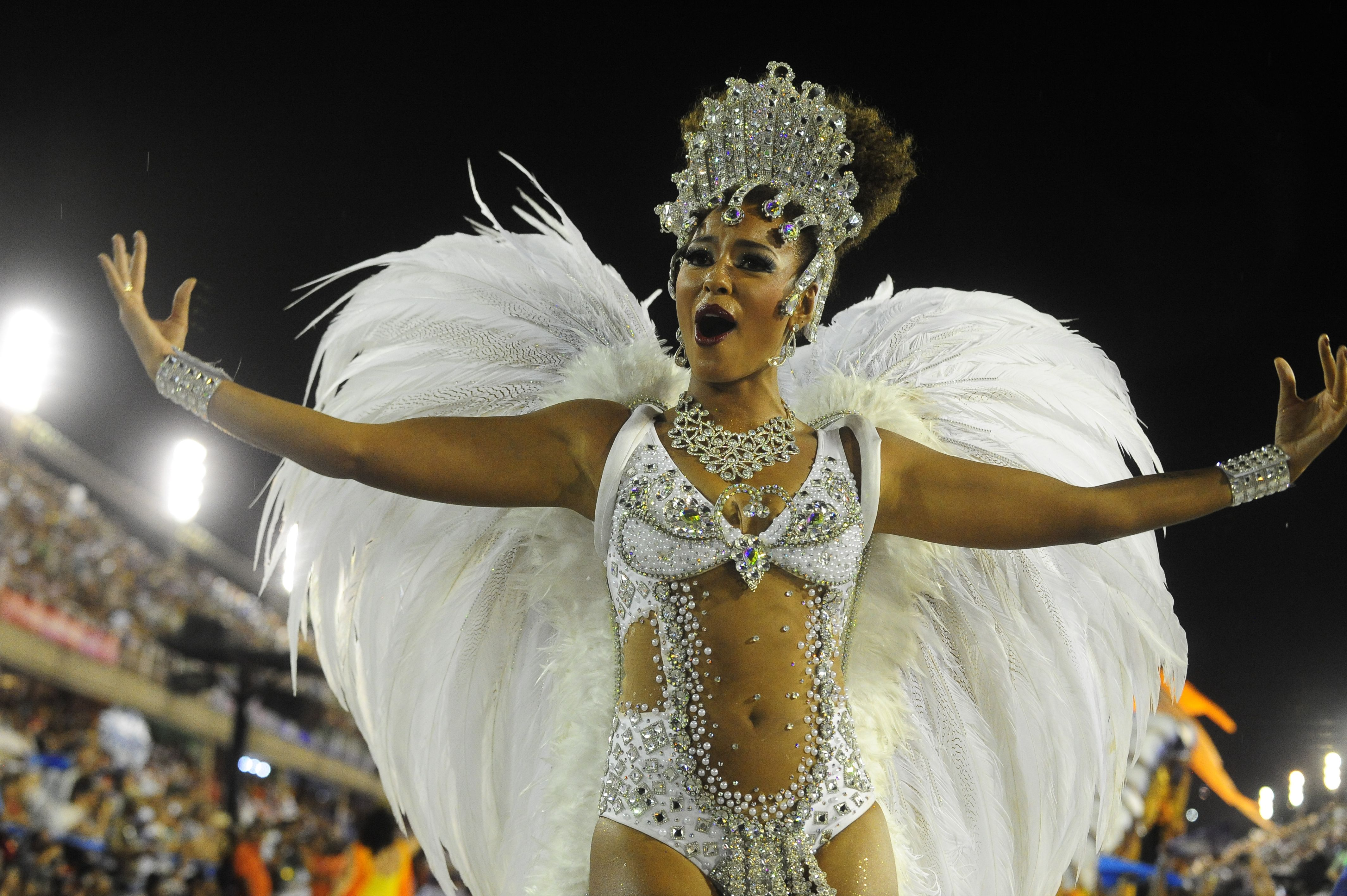 Segundo dia de desfile do Grupo Especial das Escolas de Samba do Carnaval 2015. Na avenida, a Portela (Tânia Rêgo/Agência Brasil)